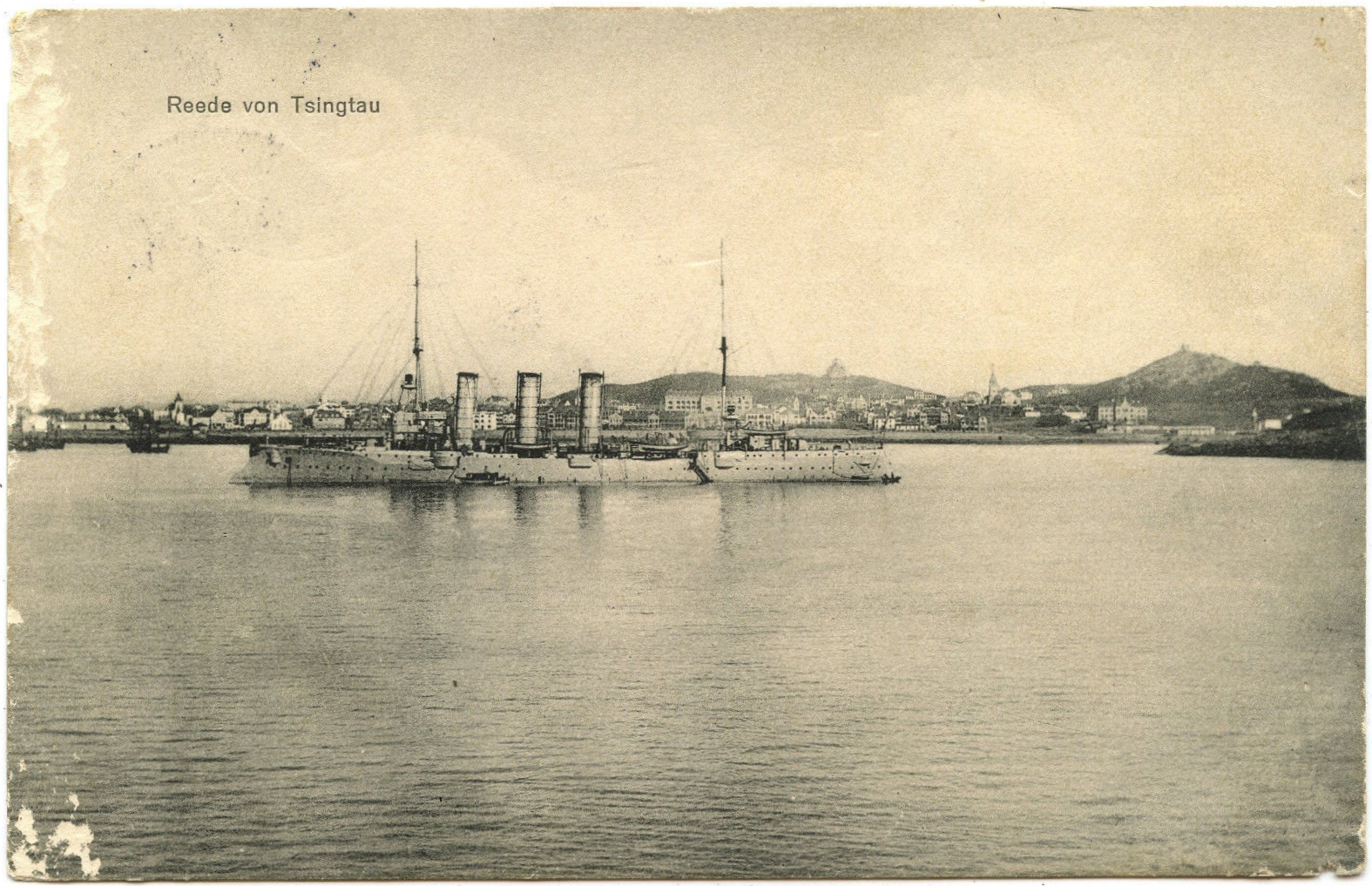 青岛湾中的德国海军莱比锡号巡洋舰（SMS Leipzig）